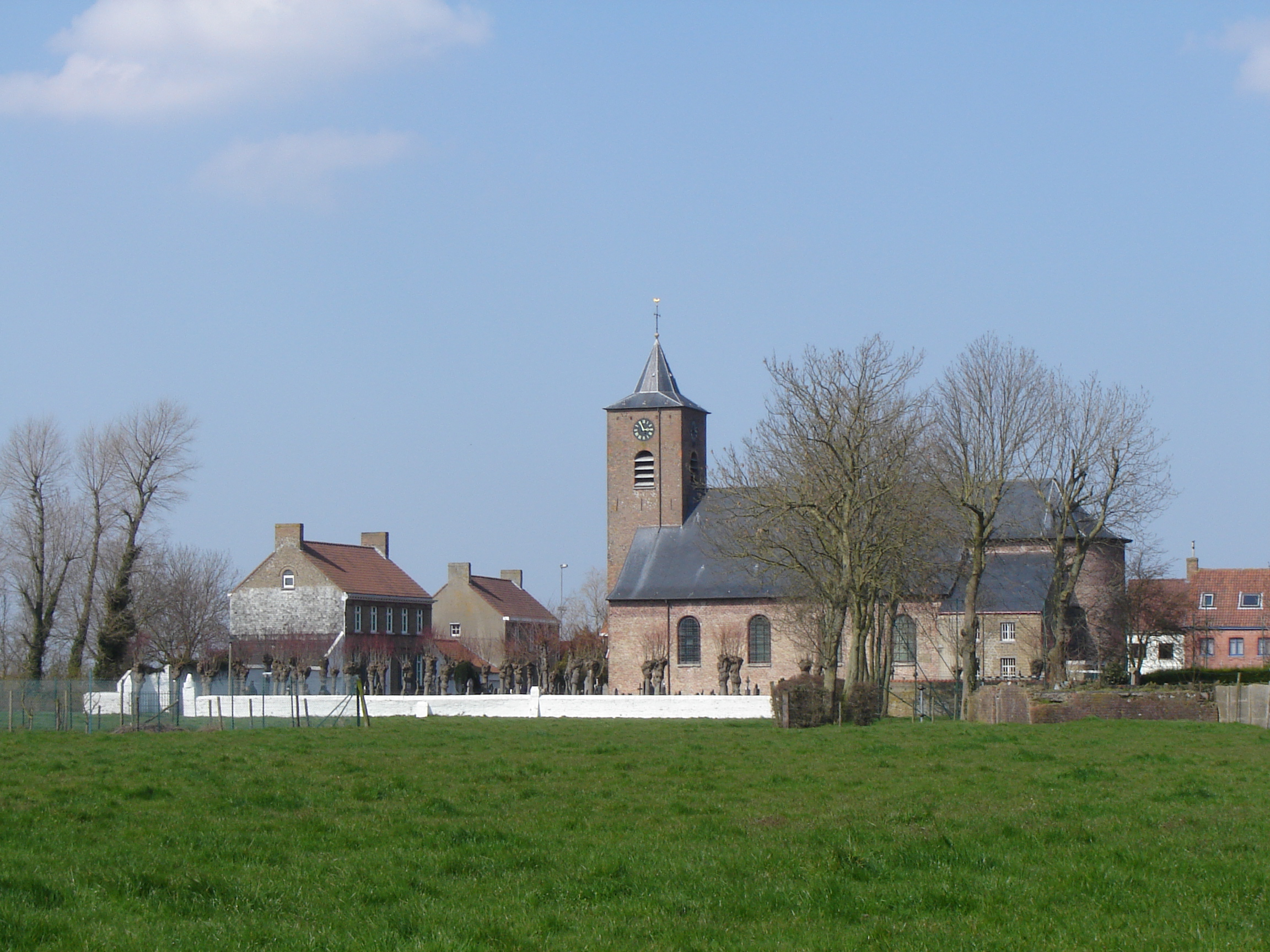 Sint-Blasiuskerk in Vlissegem Church of Saint Blaise in Vlissegem, De Haan, West Flanders, Belgium